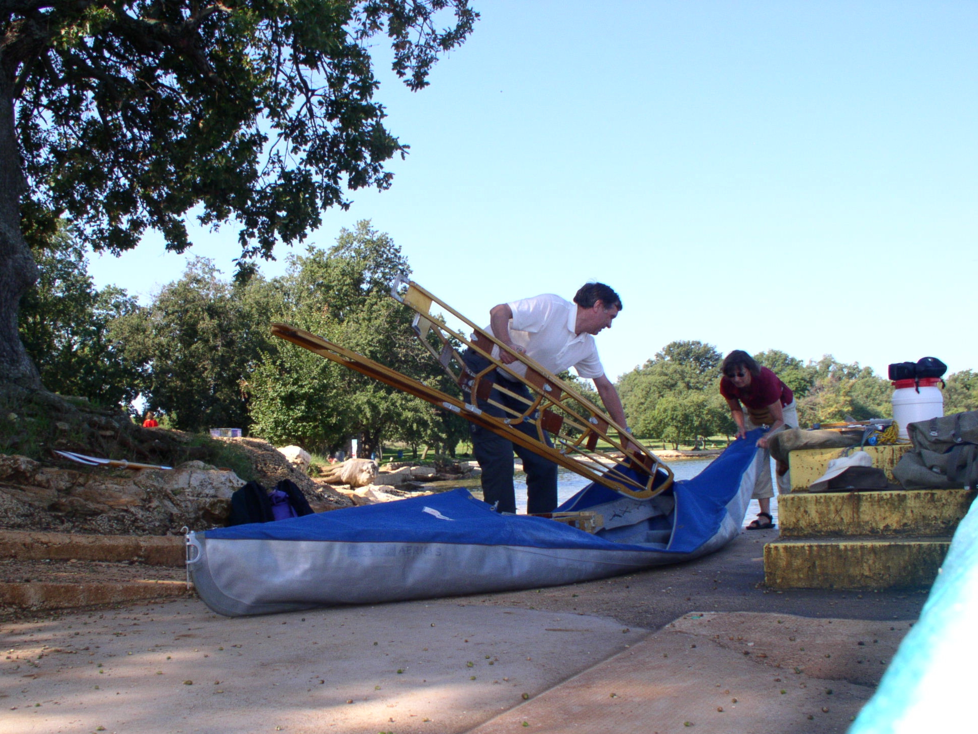 Preparing a Klepper Aerius 2 Folding Kajak